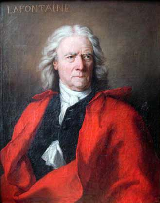 Auguste Lafontaine; huile sur toile.